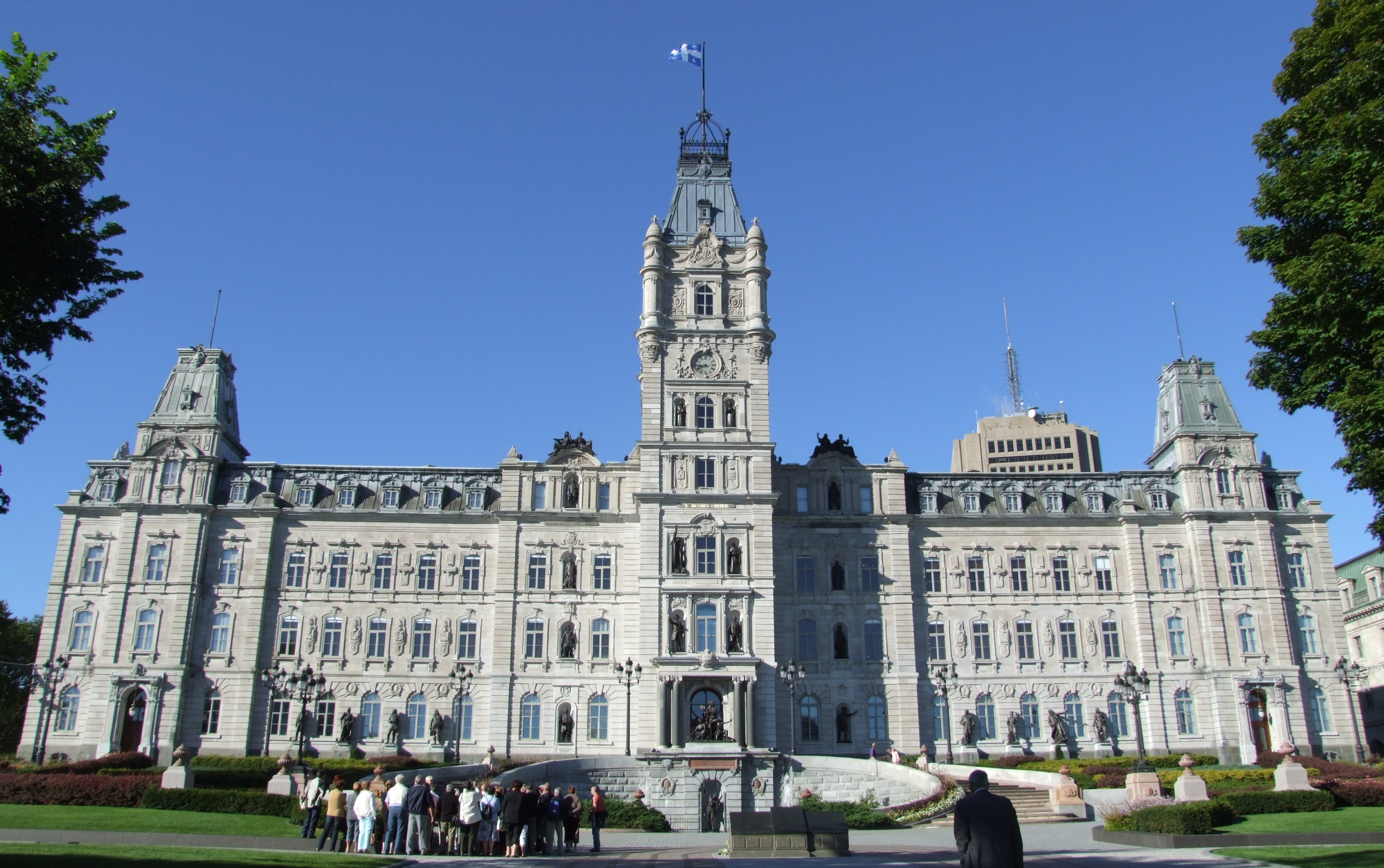 Hôtel du Parlement, ville de Québec, CANADA